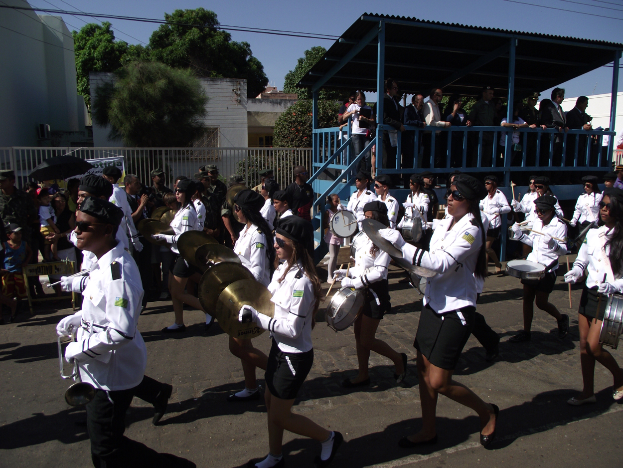 Desfile cívico de 07 de setembro.